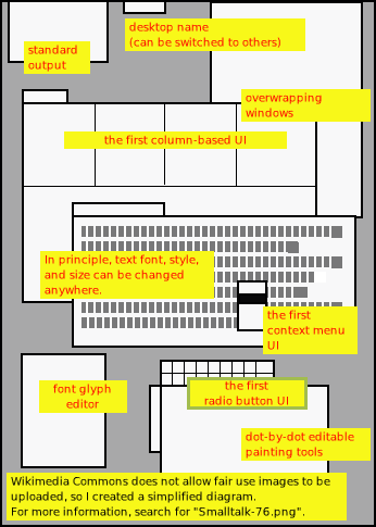 ContrAlto (Alto エミュレーター）で起動した同システムのスクリーンショット